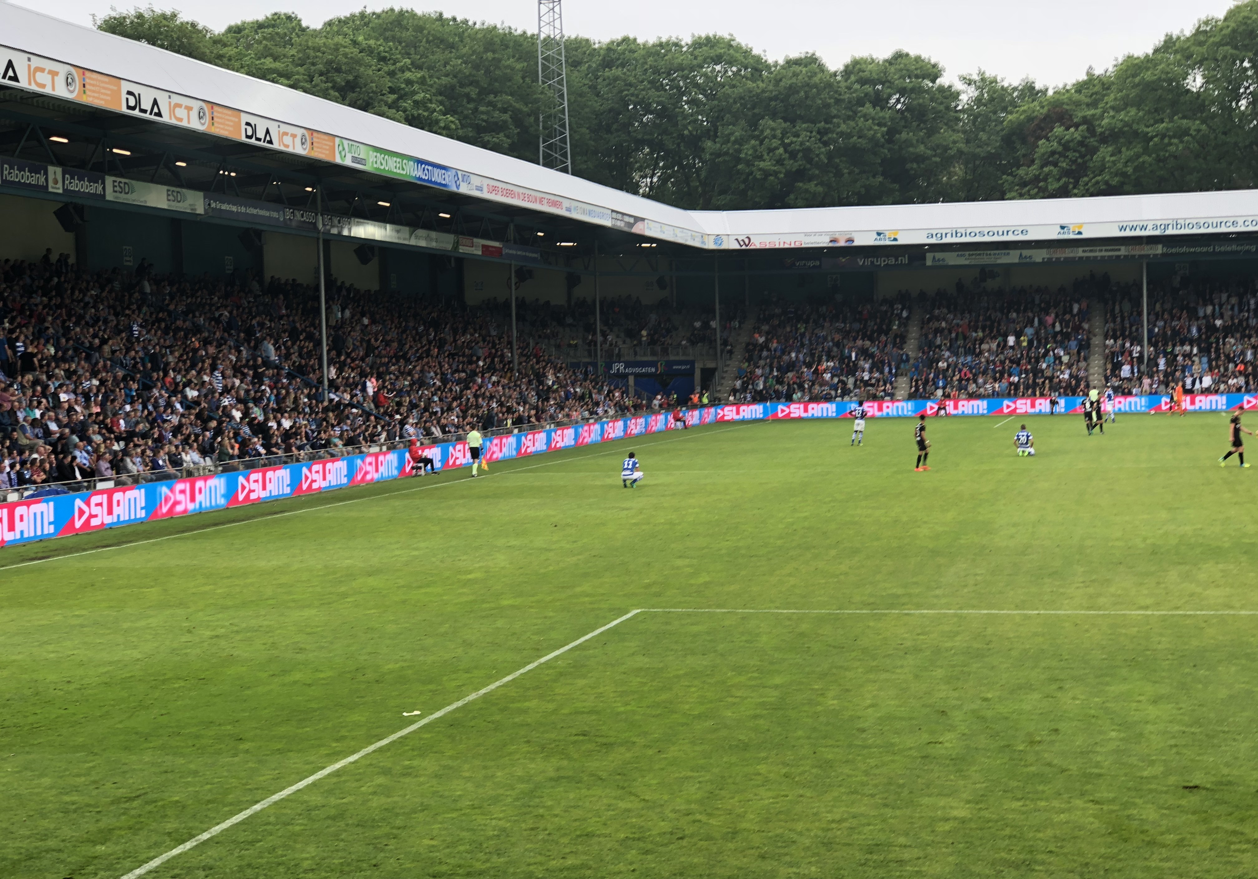 Goedgevuld Vijverberg